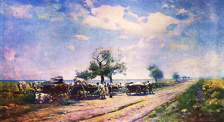 Чумацький Ромоданівський шлях/ Початок 90-х років